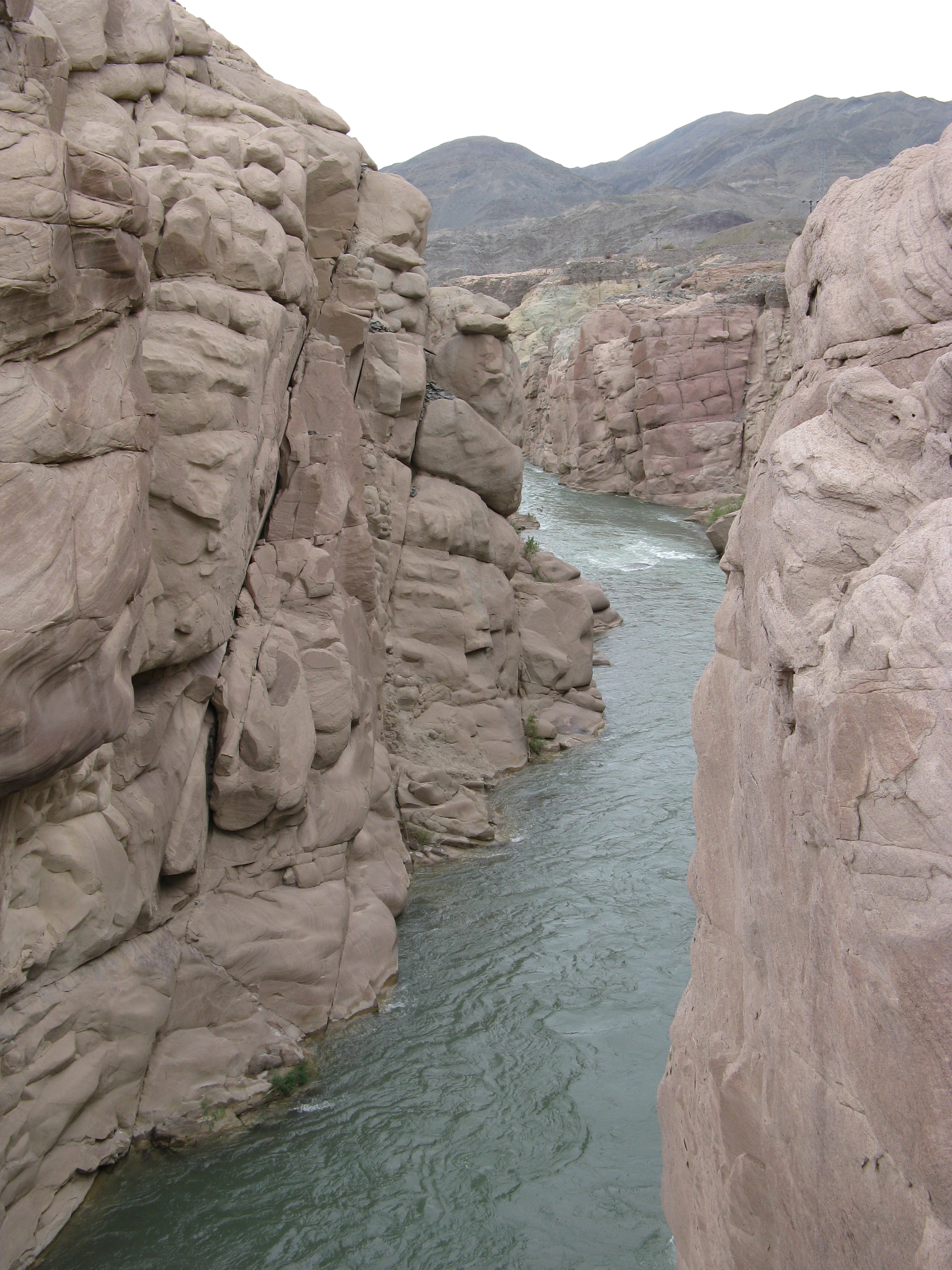 Cañón del Río Jáchal, provincia de San Juan, Argentina